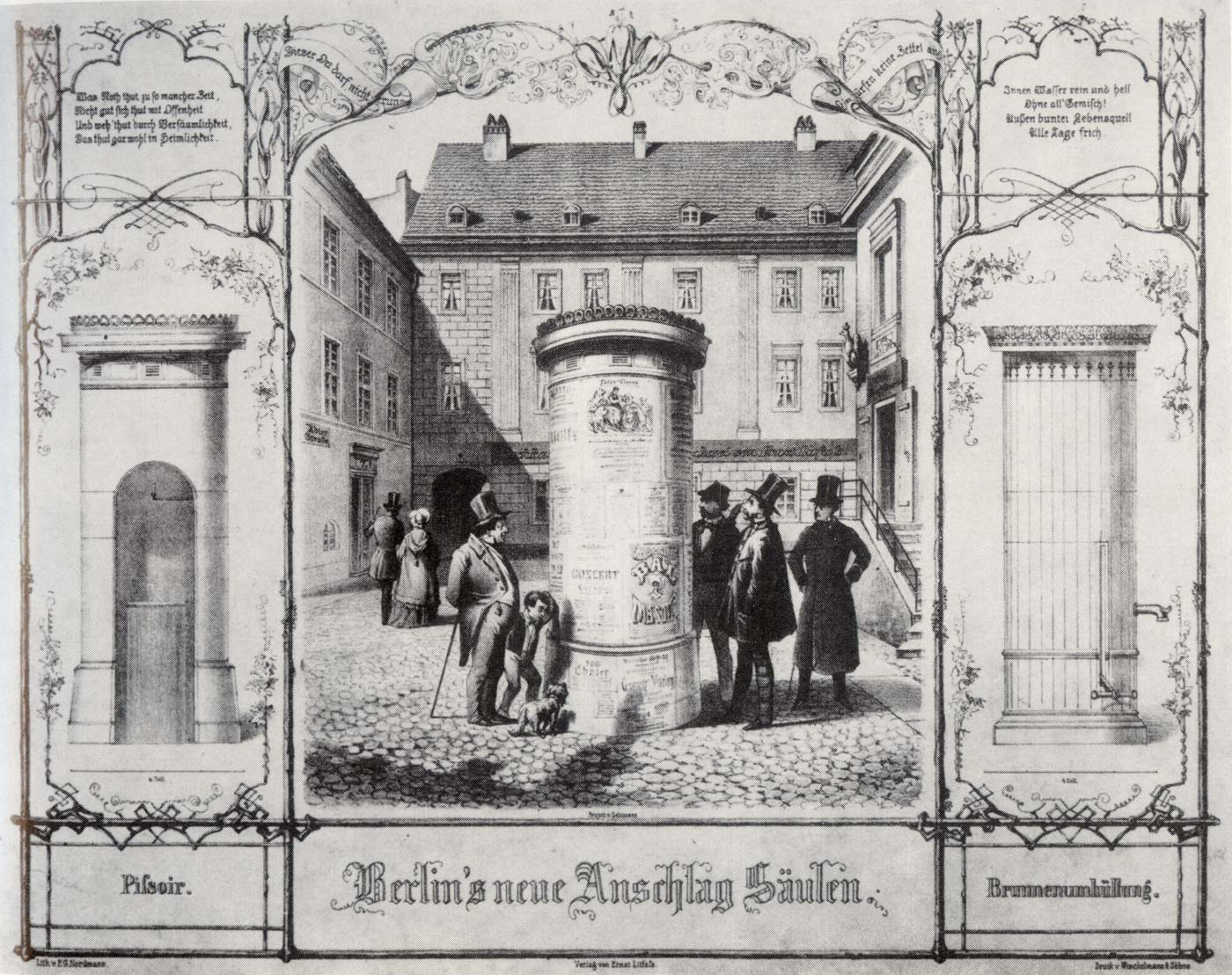 Berlins erste Litfaßsäul, Künstler: F. G. Nordmann, Lithographie um 1855